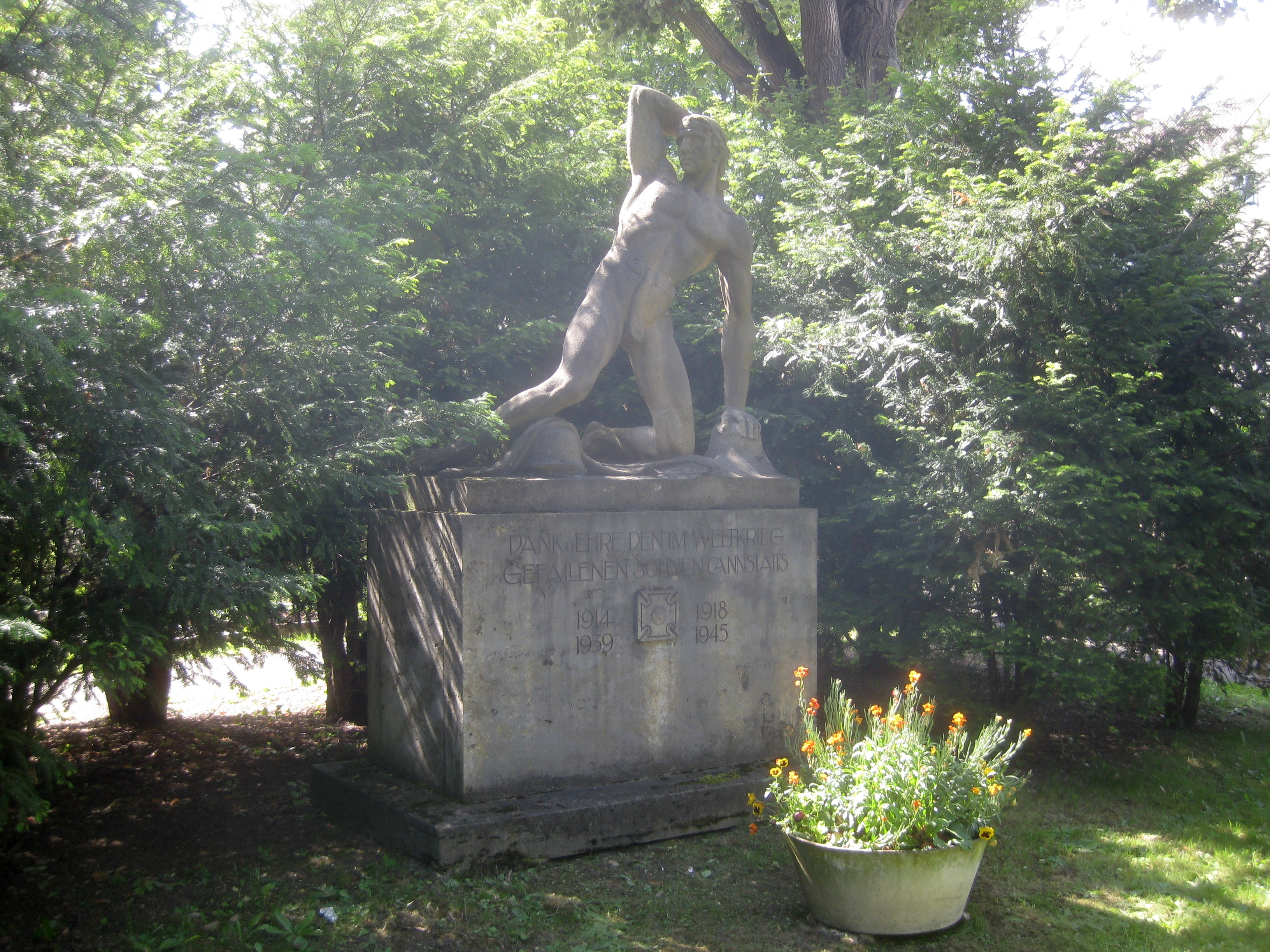 Ehrenmal für die Opfer der beiden Weltkriege von Emil Kiemlen, Stuttgart, Steigfriedhof, rechts vom Haupteingang am Sparrhärmlingweg.